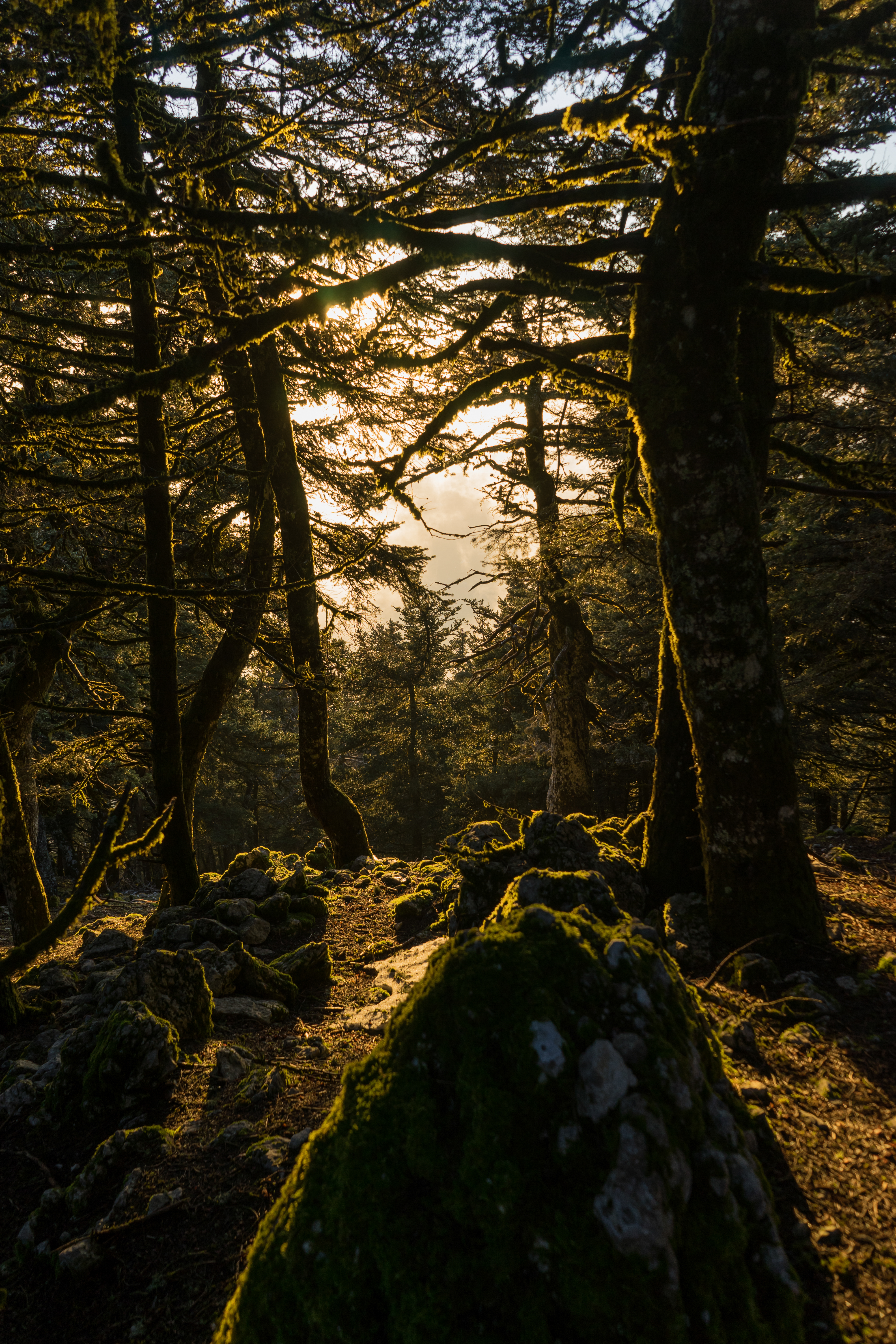 Mount Ainos fir trees at wintertime. This is a photography of Natura 2000 protected area with ID GR2220002